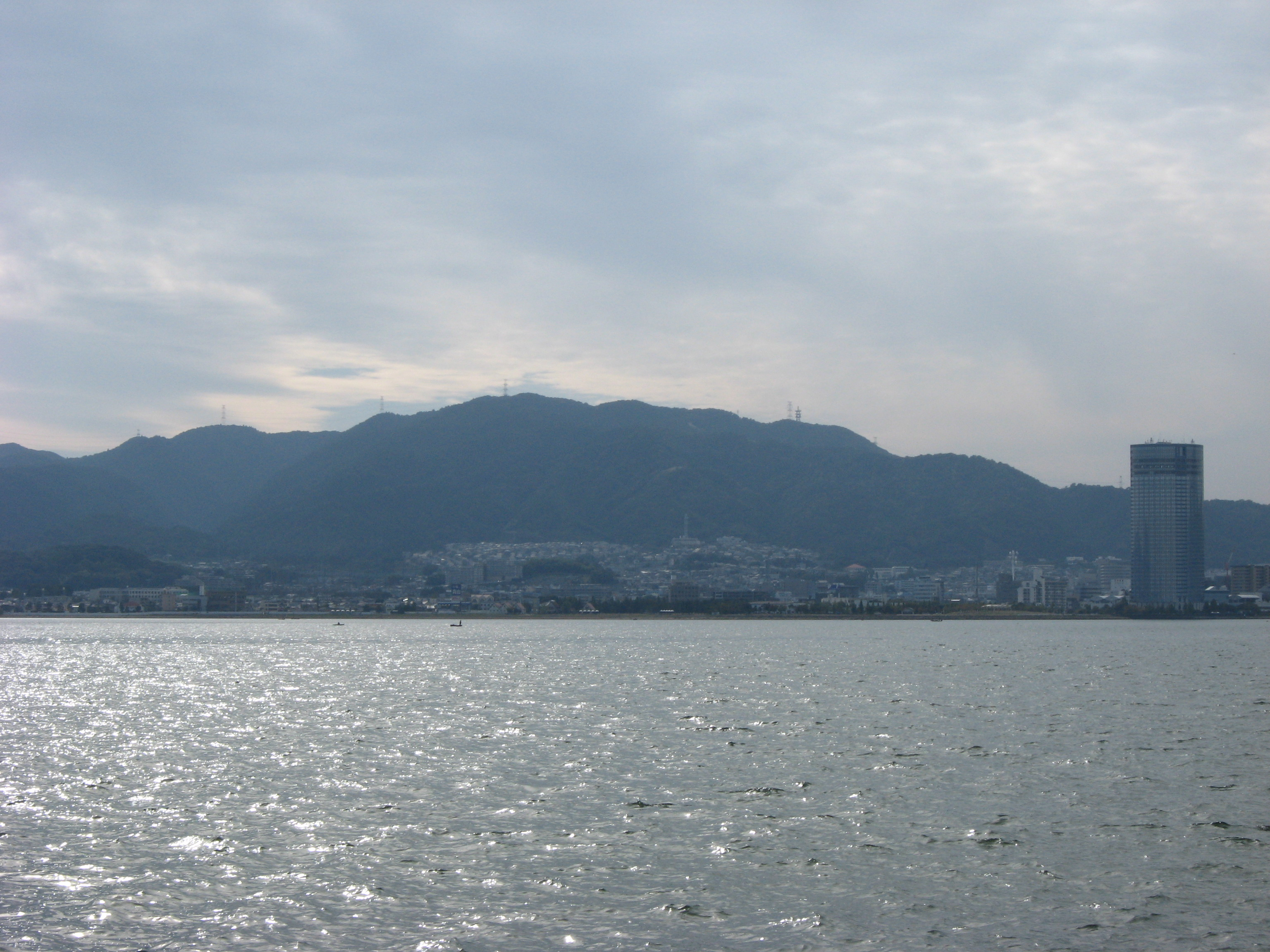 Otowayama (Shiga and Kyoto), by Shiga side.